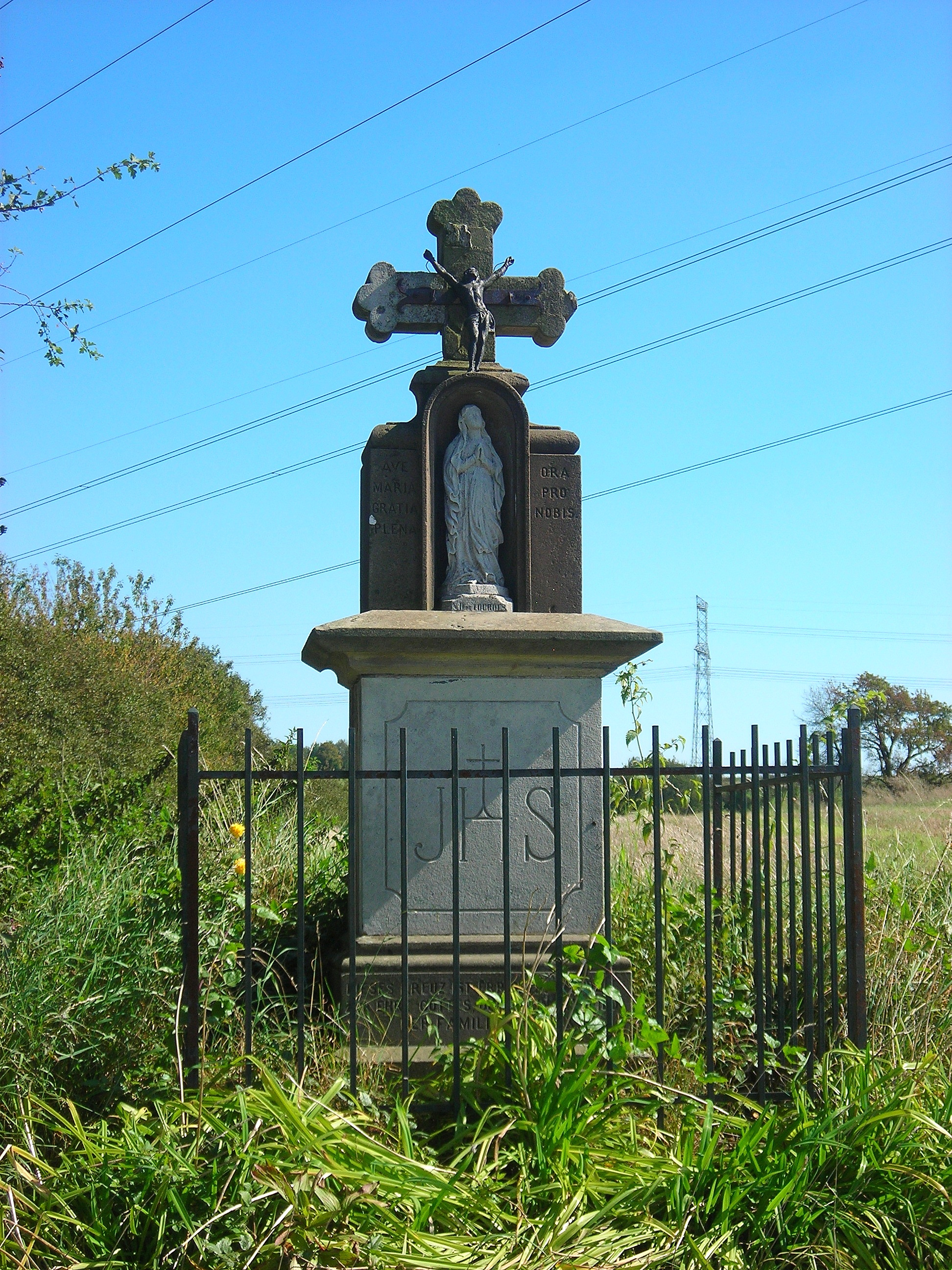 Calvaire à Obervisse (Moselle, France)